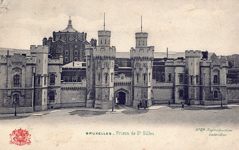 Prison de Saint-Gilles (Bruxelles, Belgique) construite entre 1878 et 1884. Carte postale ancienne tombée dans le domaine public